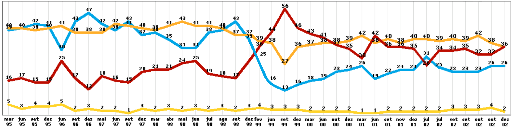 Aprovação da presidência de Fernando Henrique Cardoso entre 1995 a 2003.